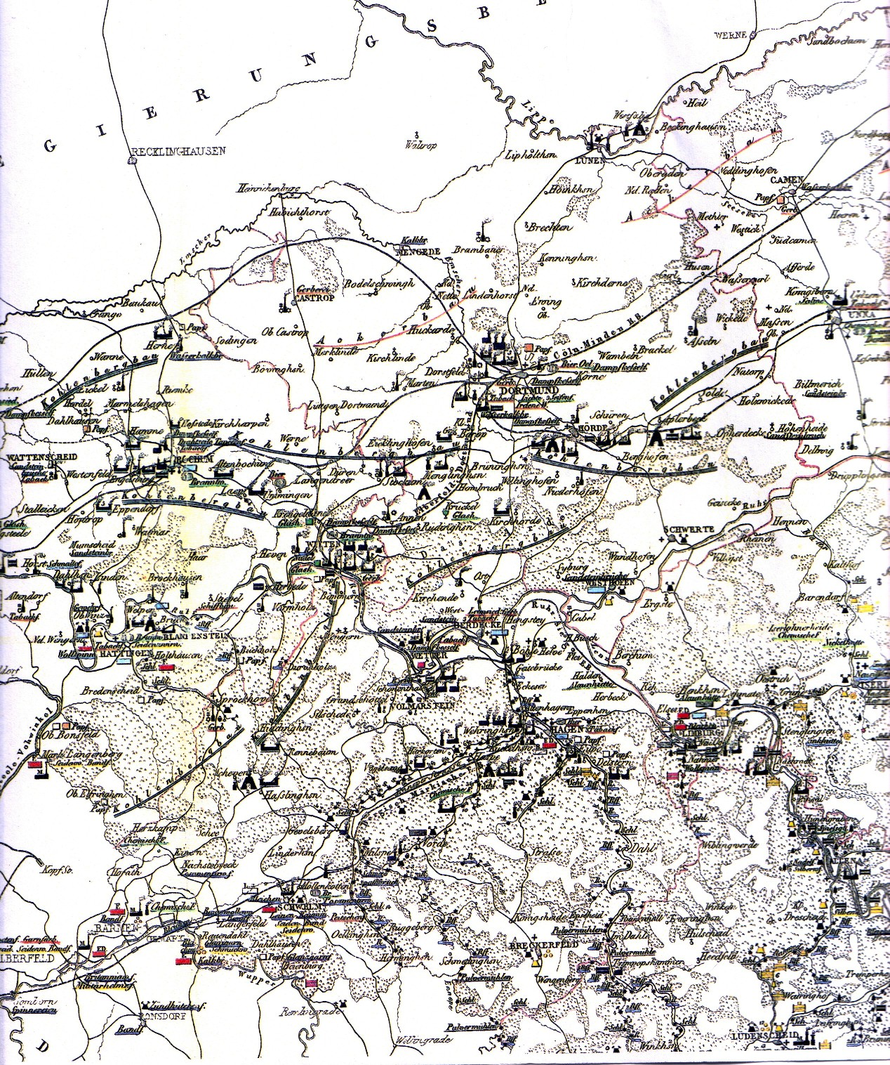 Ausschnitt Hütten- und Gewerbekarte des RB Arnsberg (aus Jacobi, Iserlohn 1858)